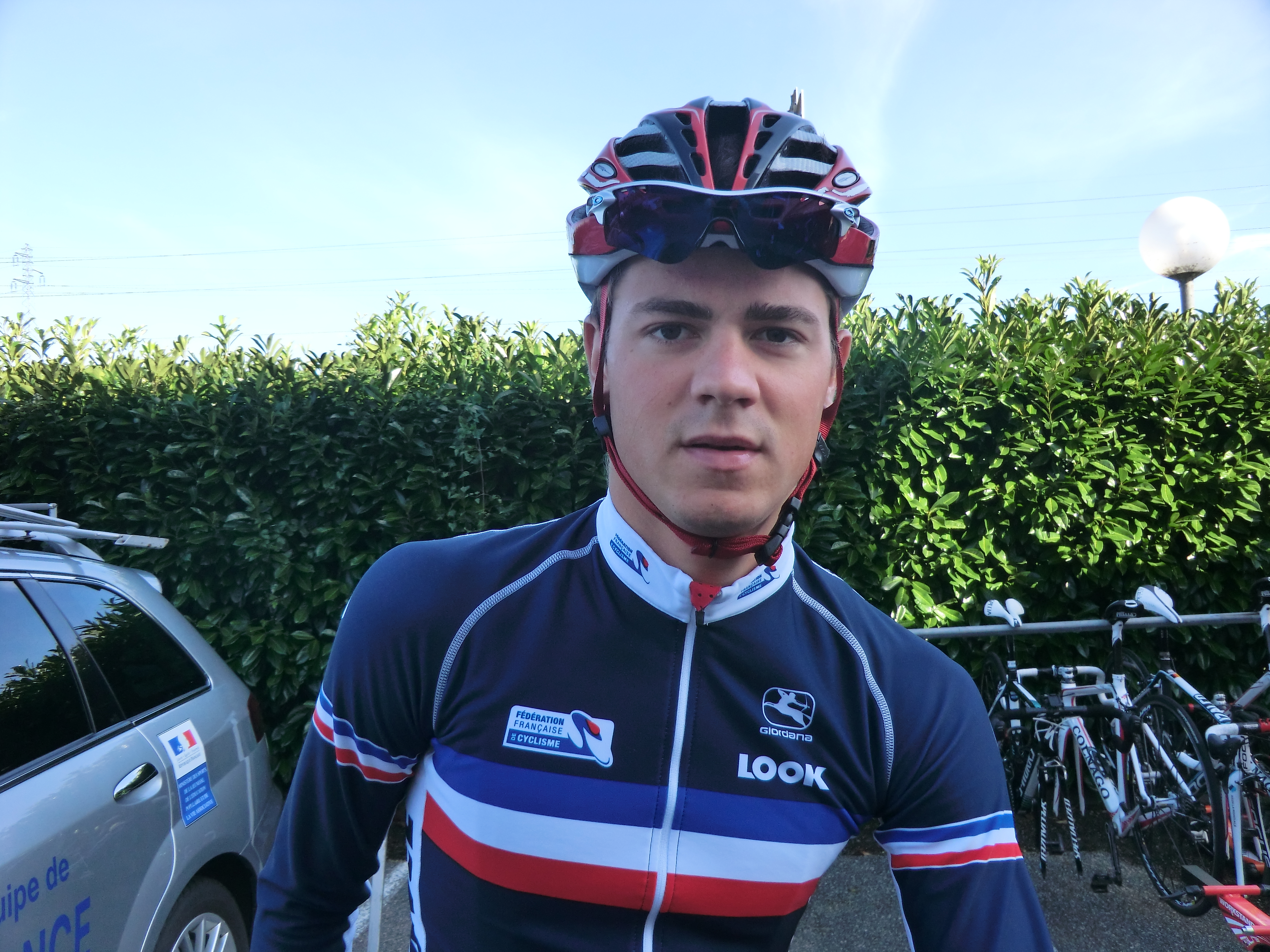 Coureurs à l'échauffement au matin du prologue du tour de l'Ain 2013, à l'hôtel Lyon-Est à Saint-Maurice-de-Beynost.